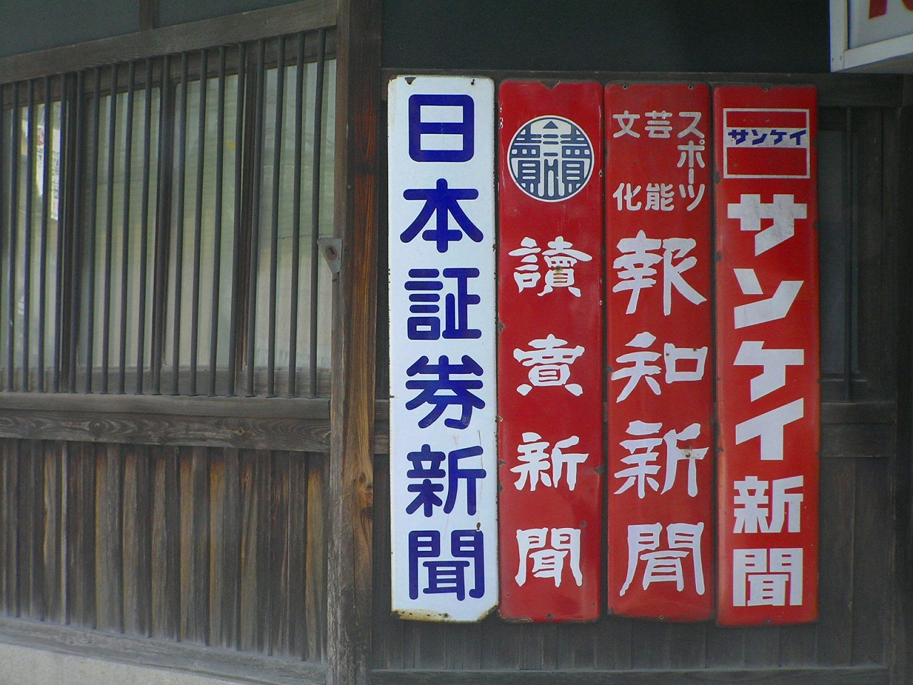 新聞販売店ホーロー看板